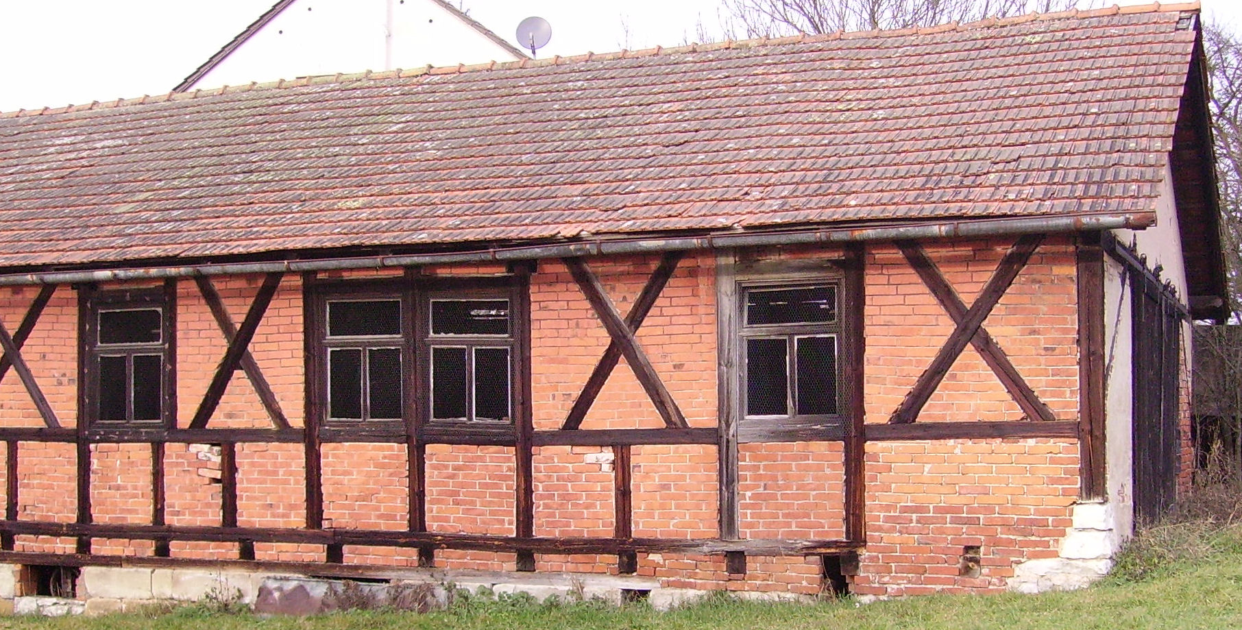 Pödeldorf, part of Litzendorf, Germany